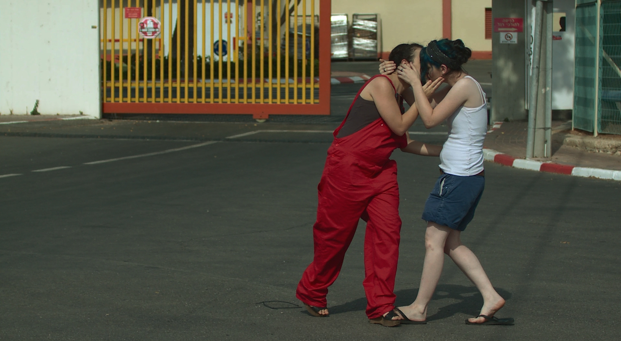 סצינת נשיקה מהסרט ג'ו + בל